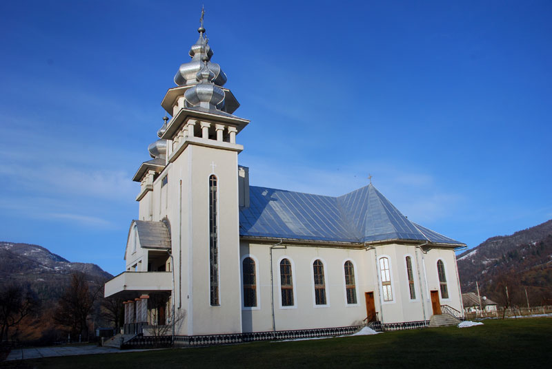 Orthodoxe Kirche in Valea Vişeului, Rumänien